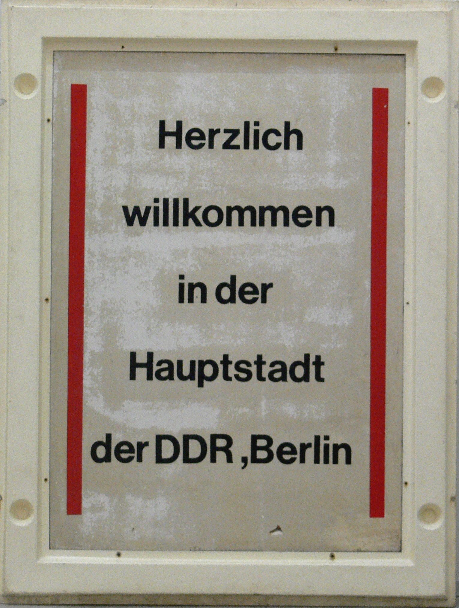 Hinweisschild "Herzlich willkommen in der Hauptstadt der DDR, Berlin", Original aus DDR-Zeiten, bis ca. 1990 am Grenzübergang Bornholmer Straße angebracht. Mit falsch gesetztem Komma – nach, statt vor dem Wortzwischenraum (vgl. Plenk).